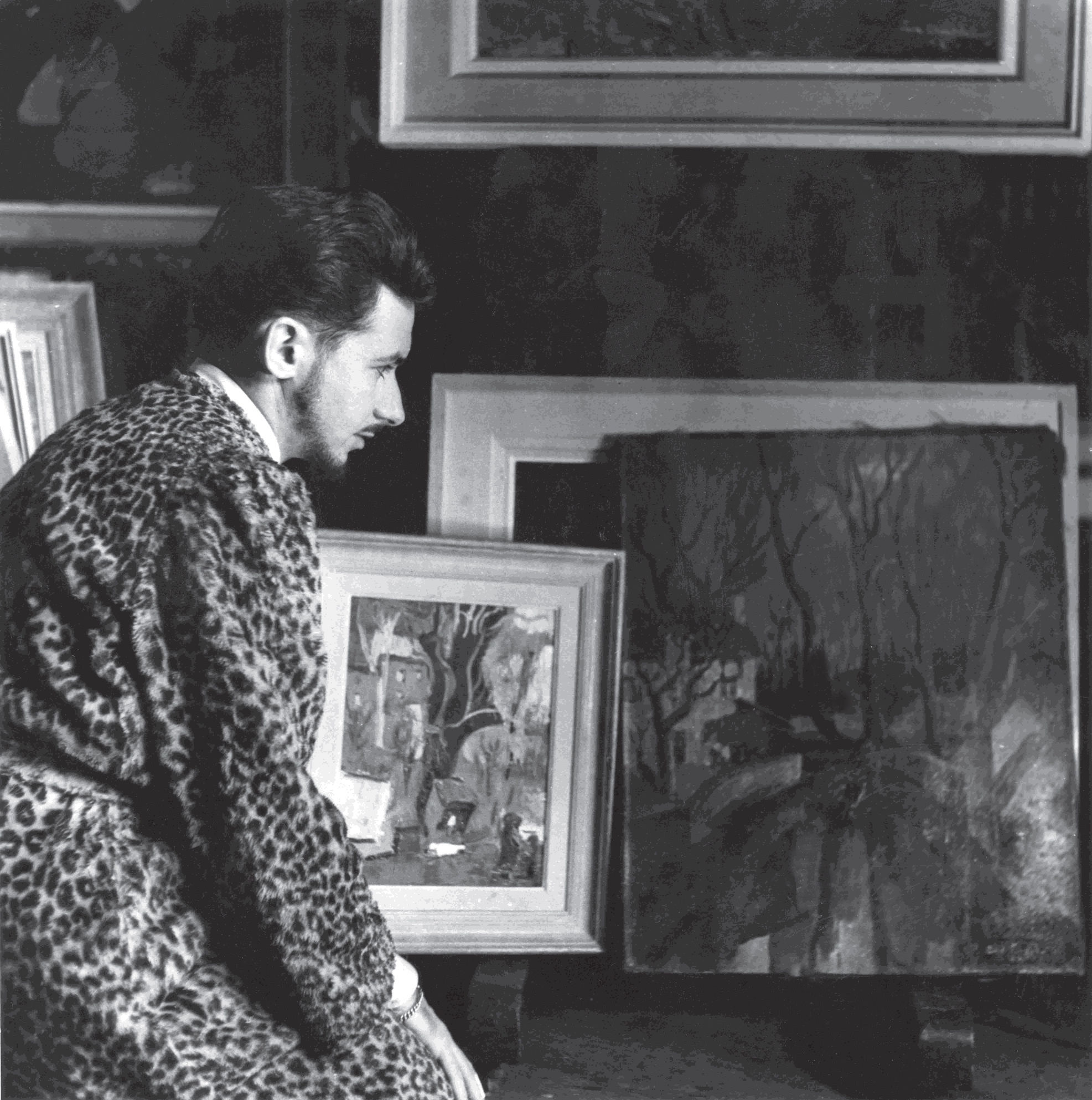 José admirant ses tableaux